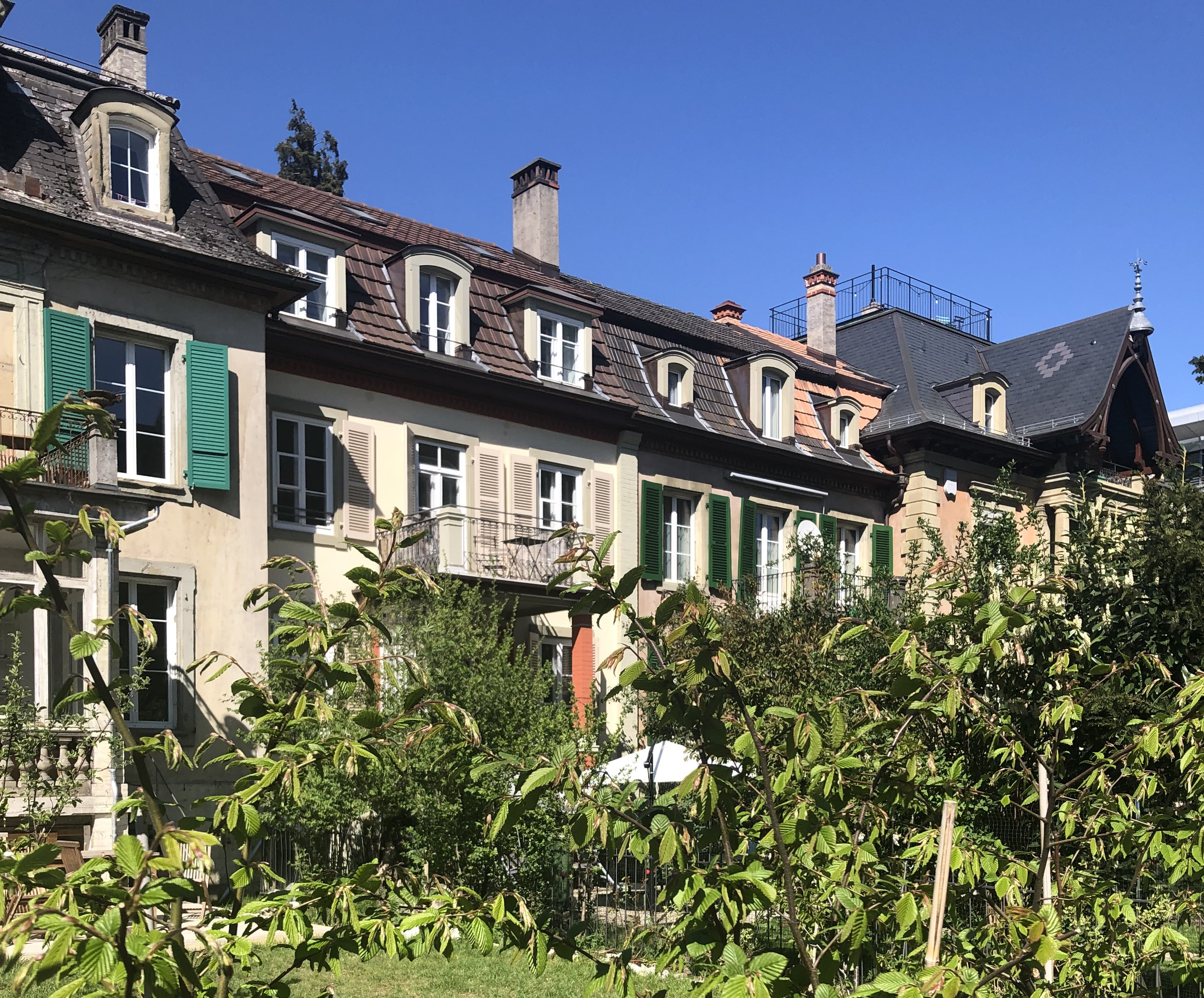 Villette Wohnbenauung Effingerstrasse